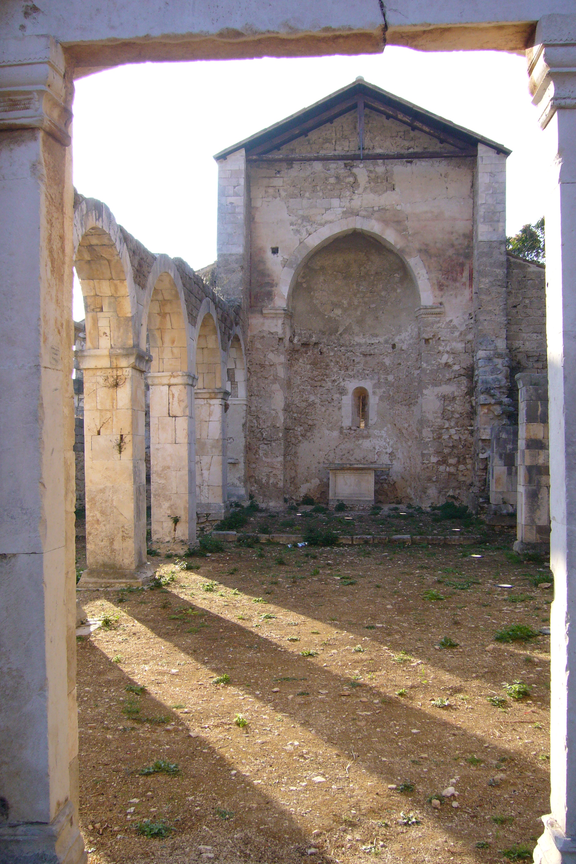 Rovine della vecchia chiesa